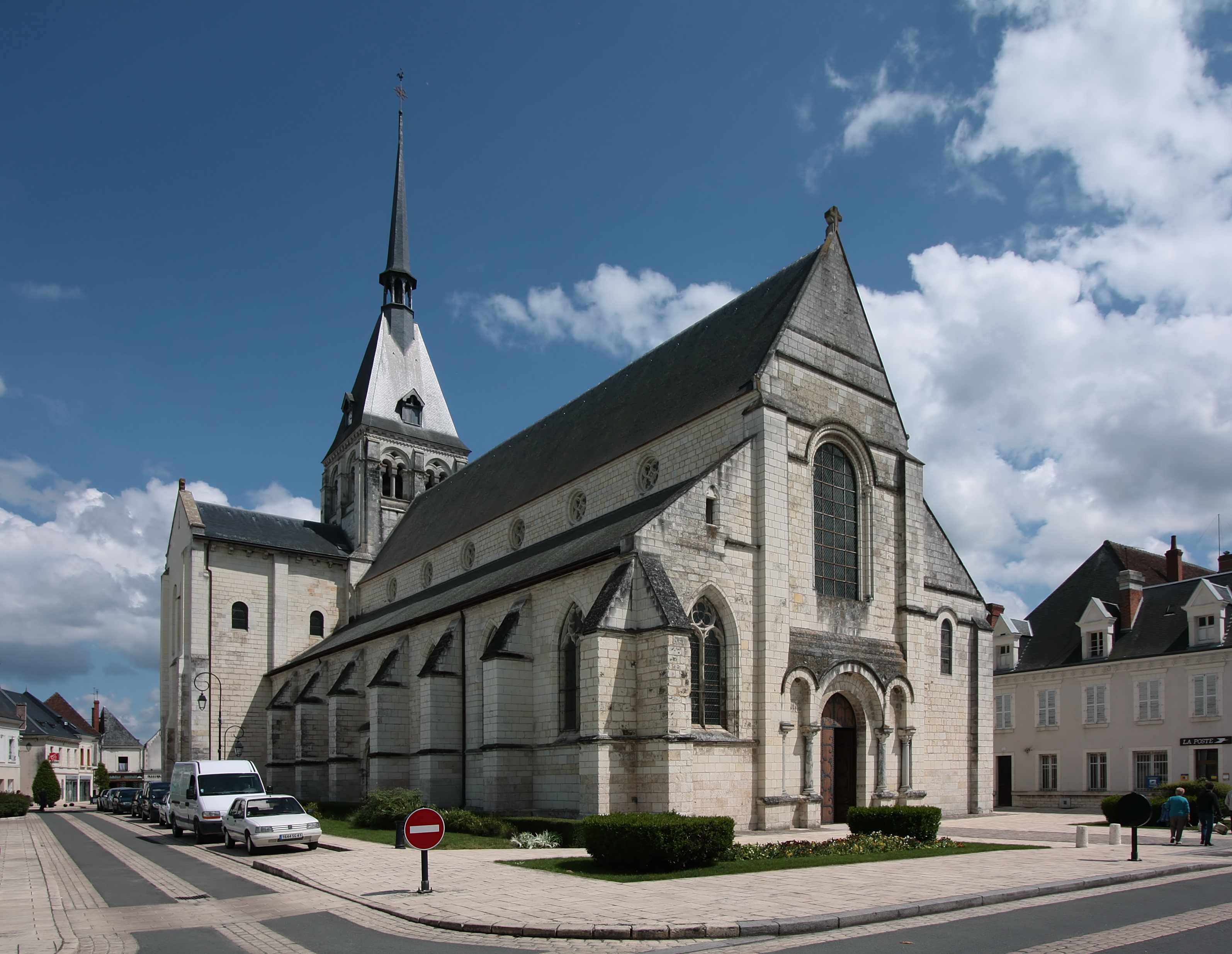 Selles-sur-Cher im Département Loir-et-Cher/Frankreich - Kirche Notre-Dame-la-Blanche, Abbatiale Saint-Eusice.